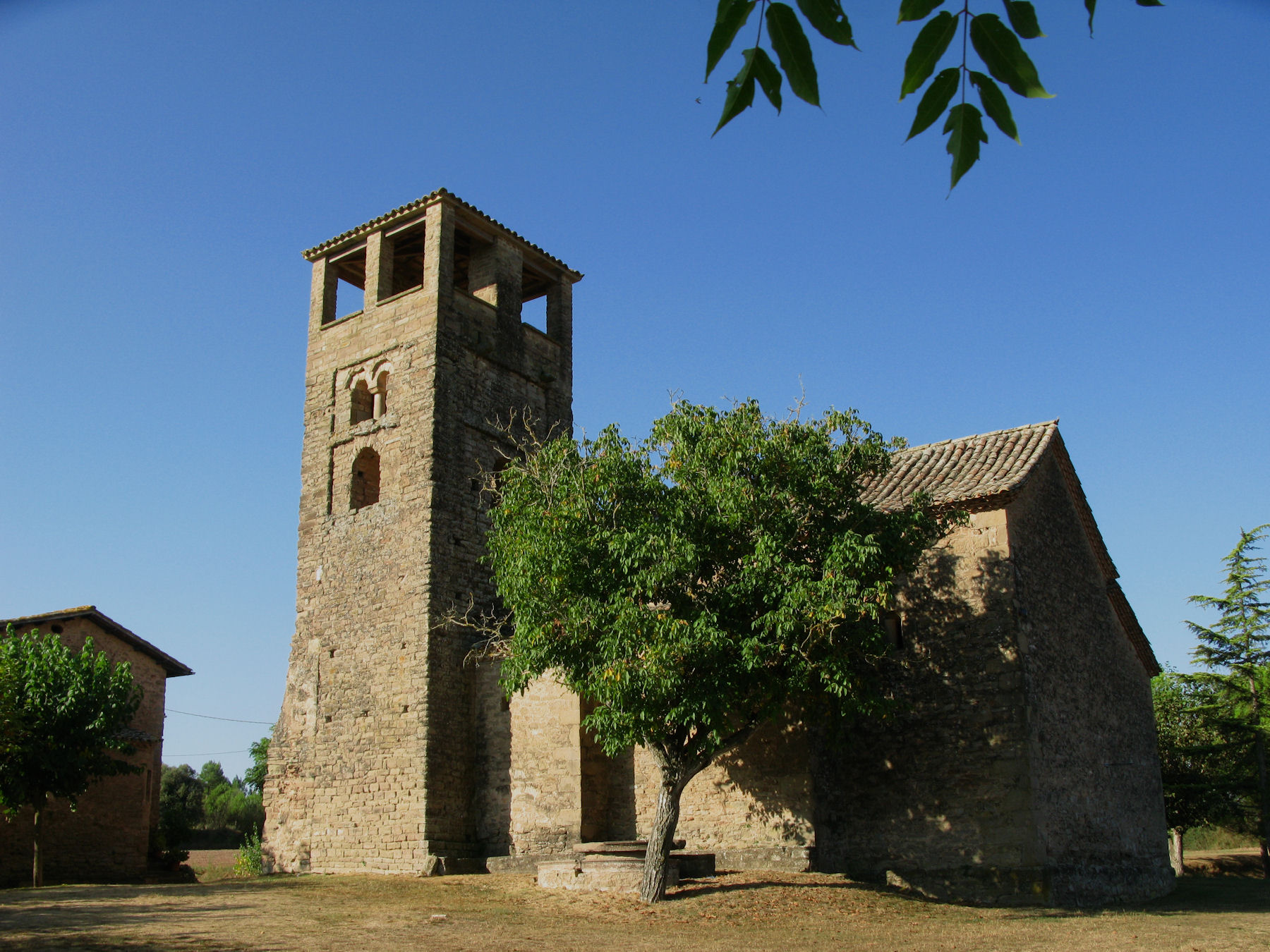 Església de Santa Eugènia de Relat - Avinyó